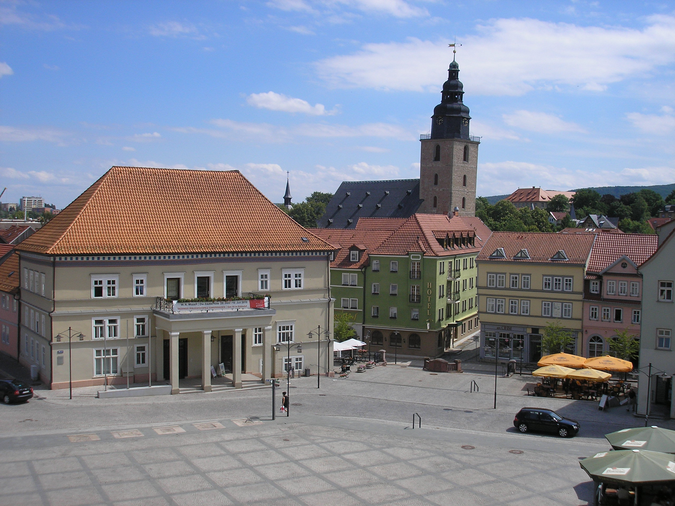 Blick über den Markt mit Rathaus und Stadtkirche in Sondershausen (Thüringen).